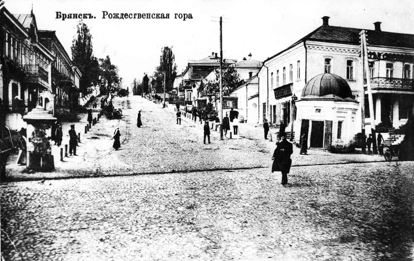 Брянск начала ХХ века. Рождественская гора (вид от Соборной площади).